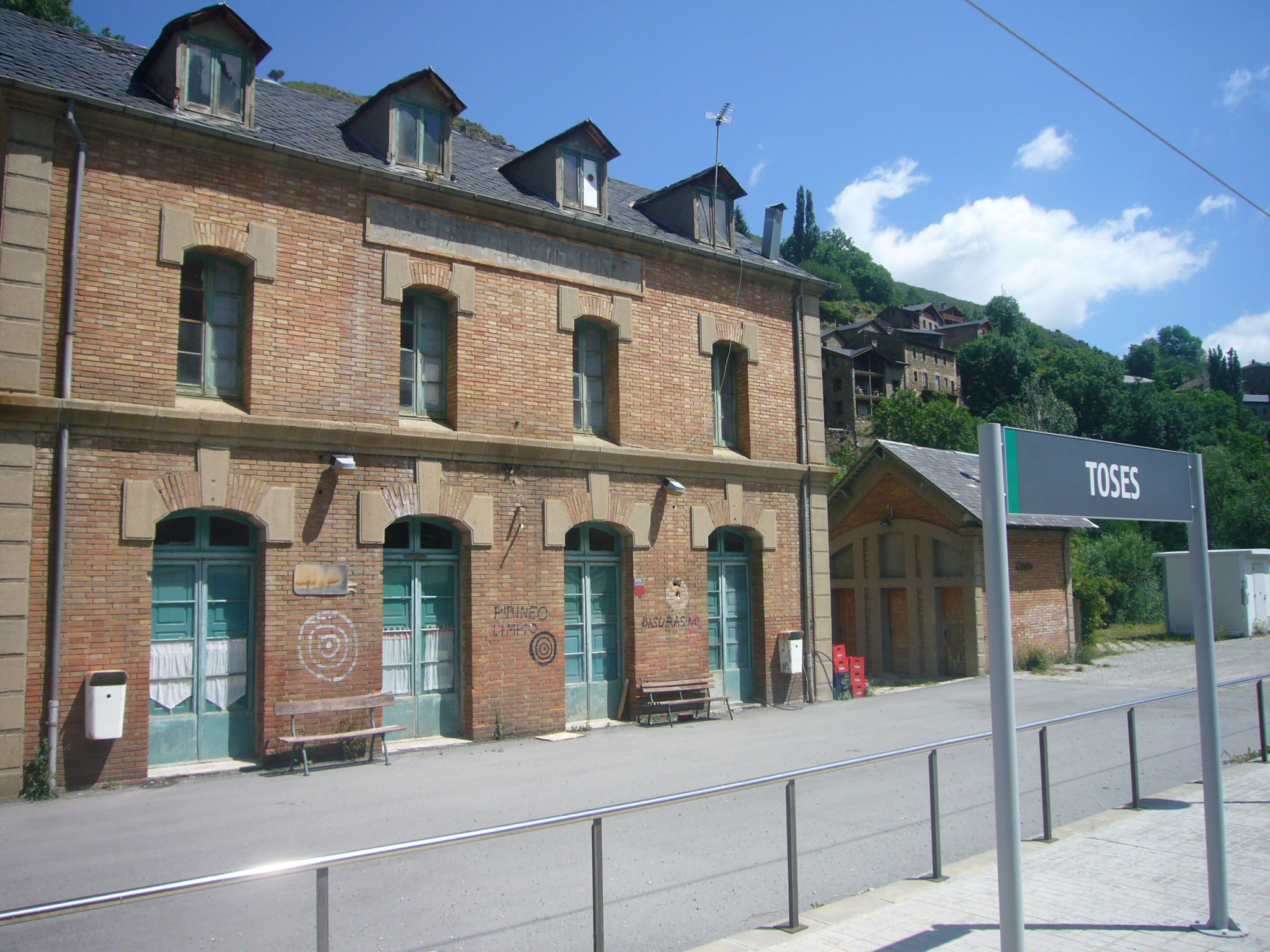 Estació de tren - Toses